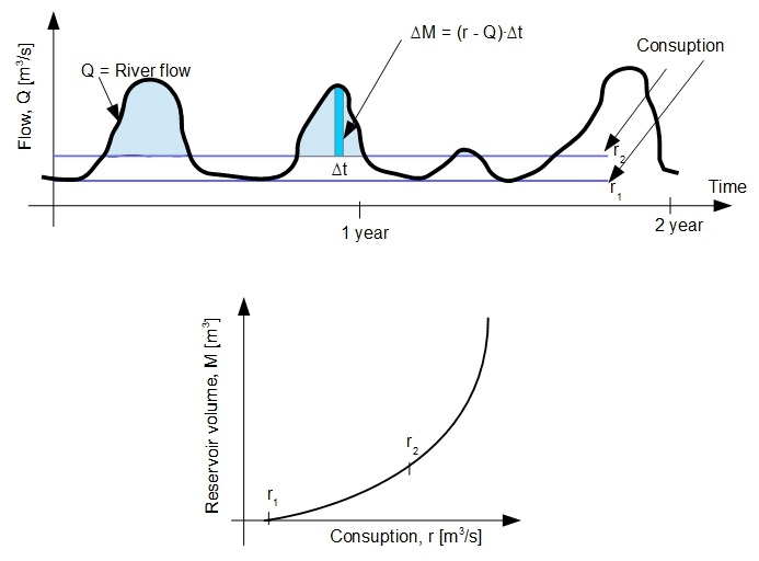 Explanation for water flow in a stream and degree of reservoir accumulation. Construction of reservoir curve.